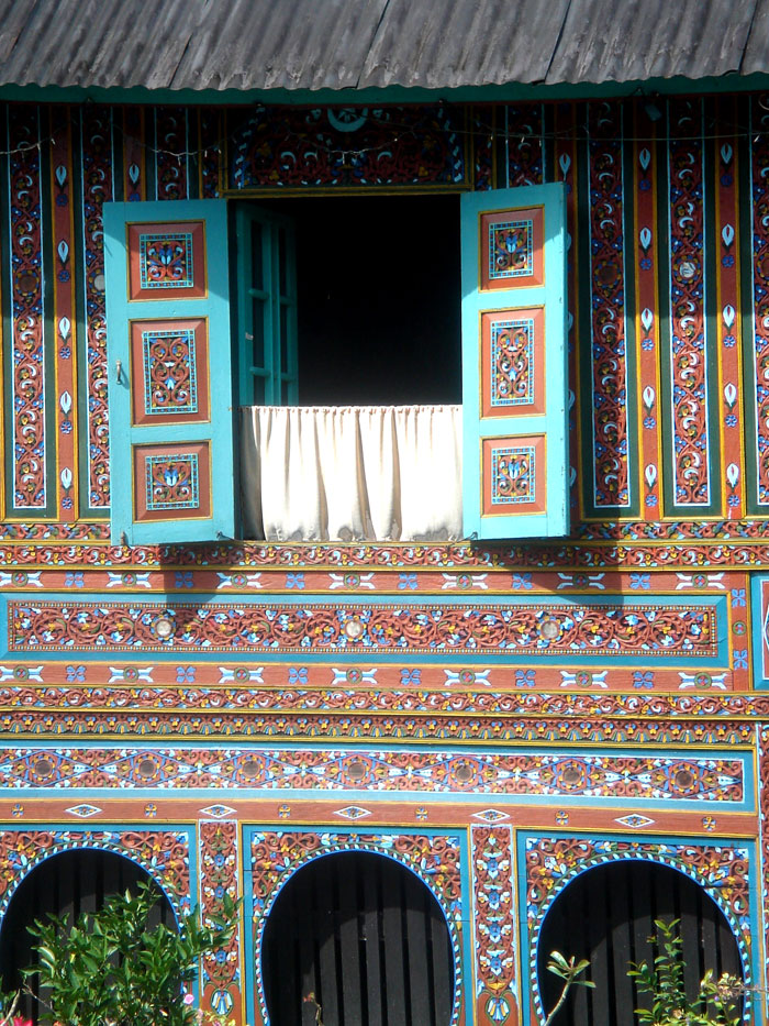 Rumah gadang near Lake Singkarak, West Sumatra, Indonesia.